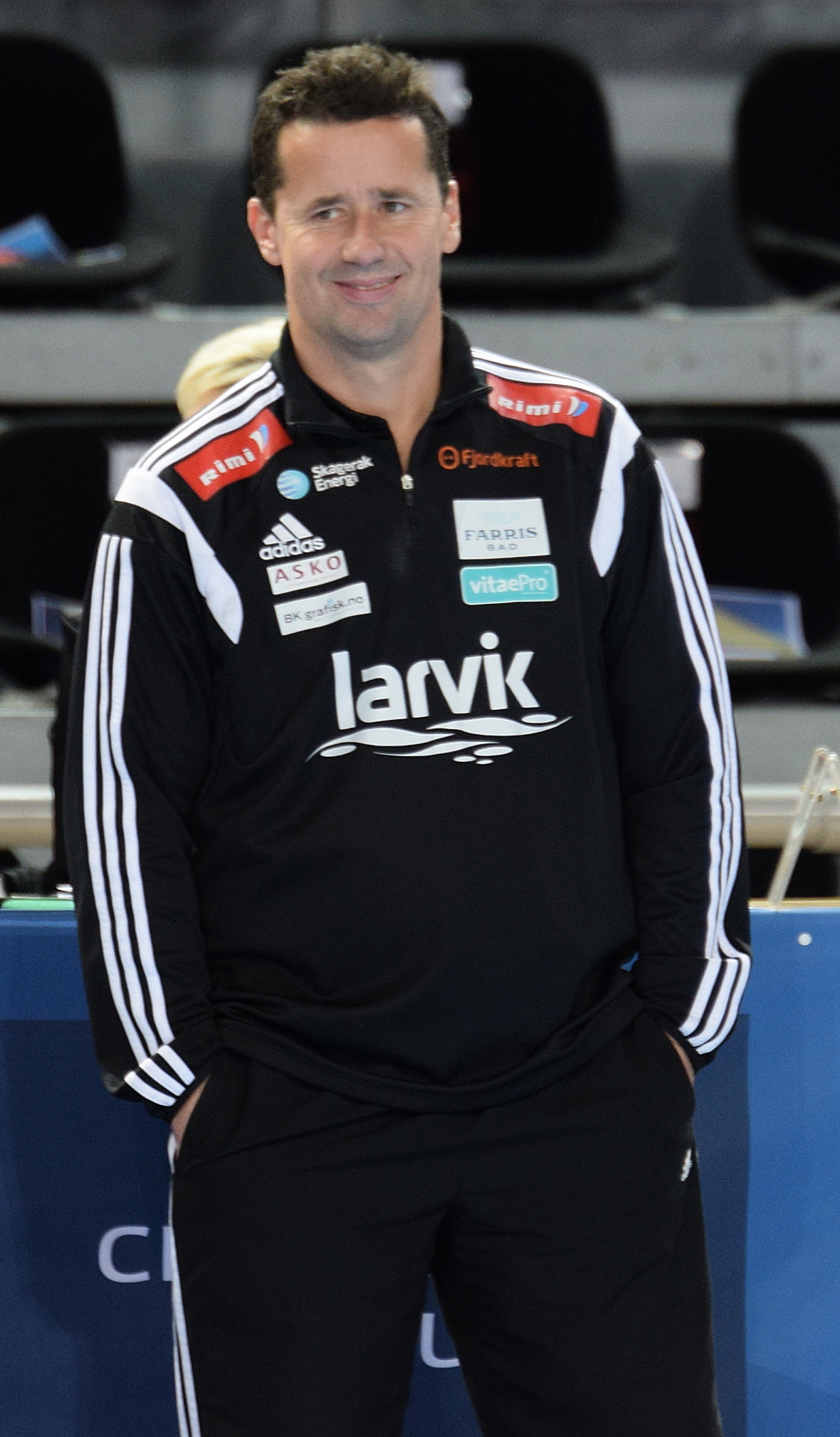 Lors de la rencontre de ligue des champions entre Metz Handball et Larvik HK. A Metz, le 15 novembre 2014.